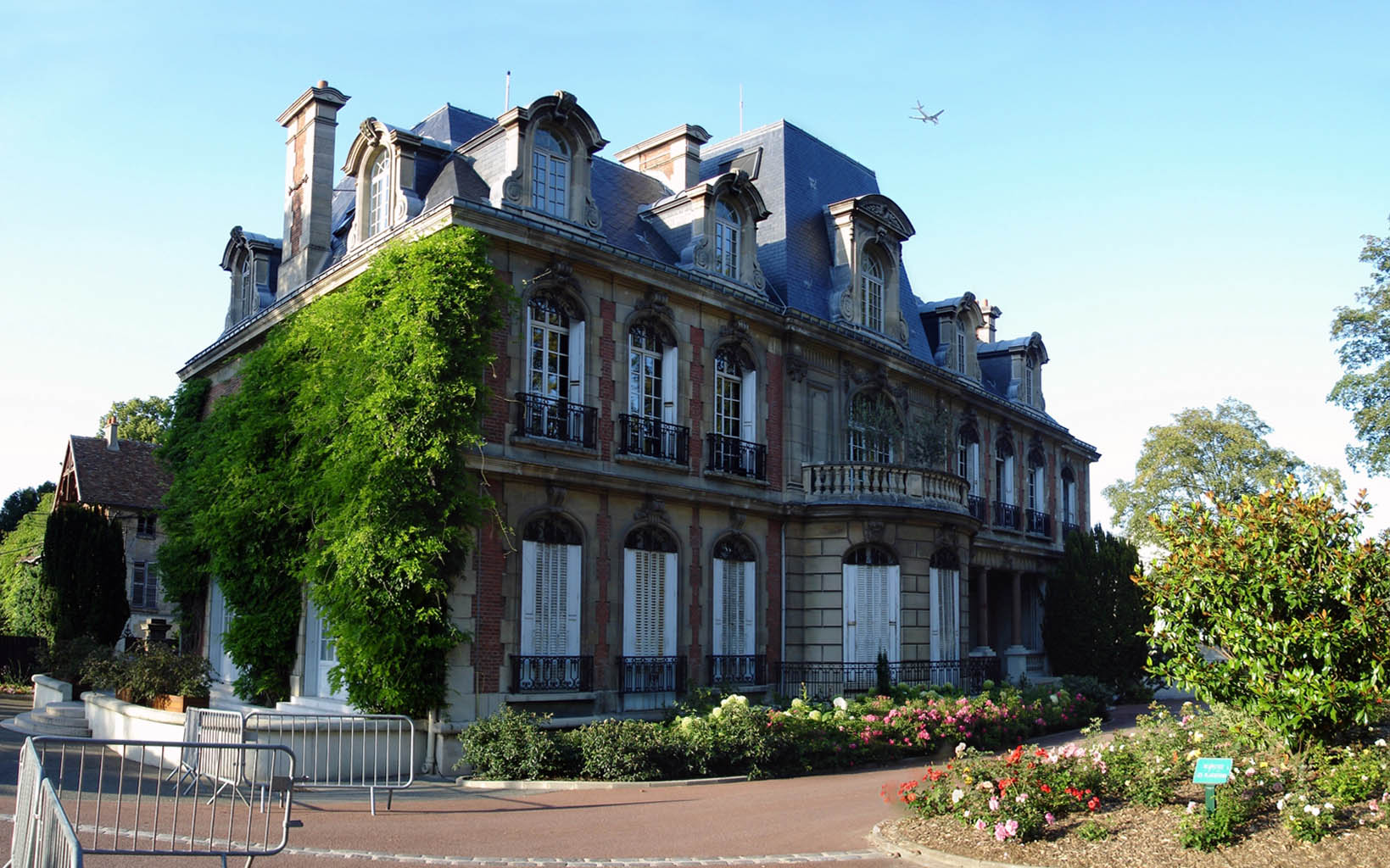 L'hôtel de ville de Gonesse (Val-d'Oise), France